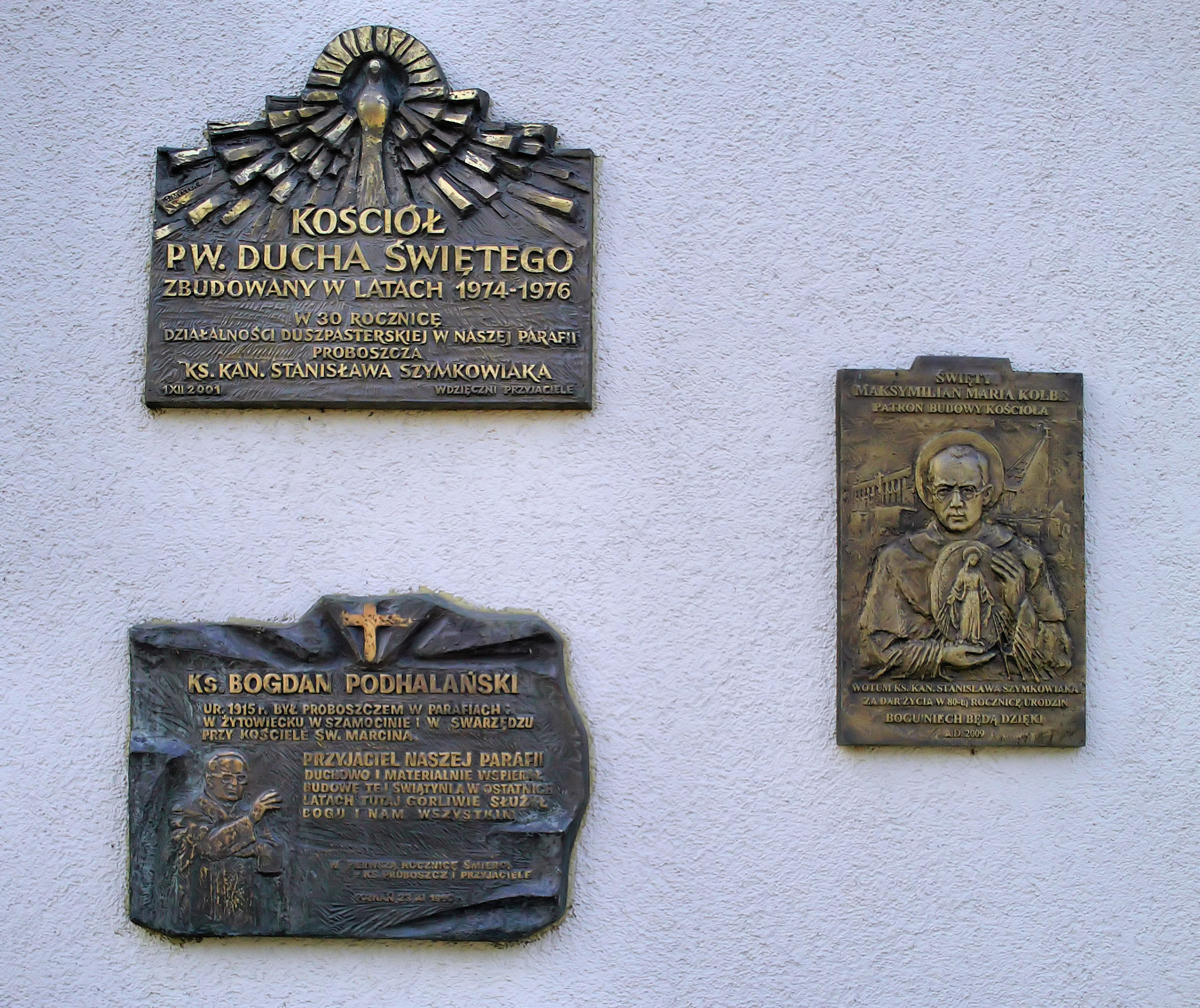 Tablice pamiątkowe, Kościół Ducha Świętego, Poznań, Polska